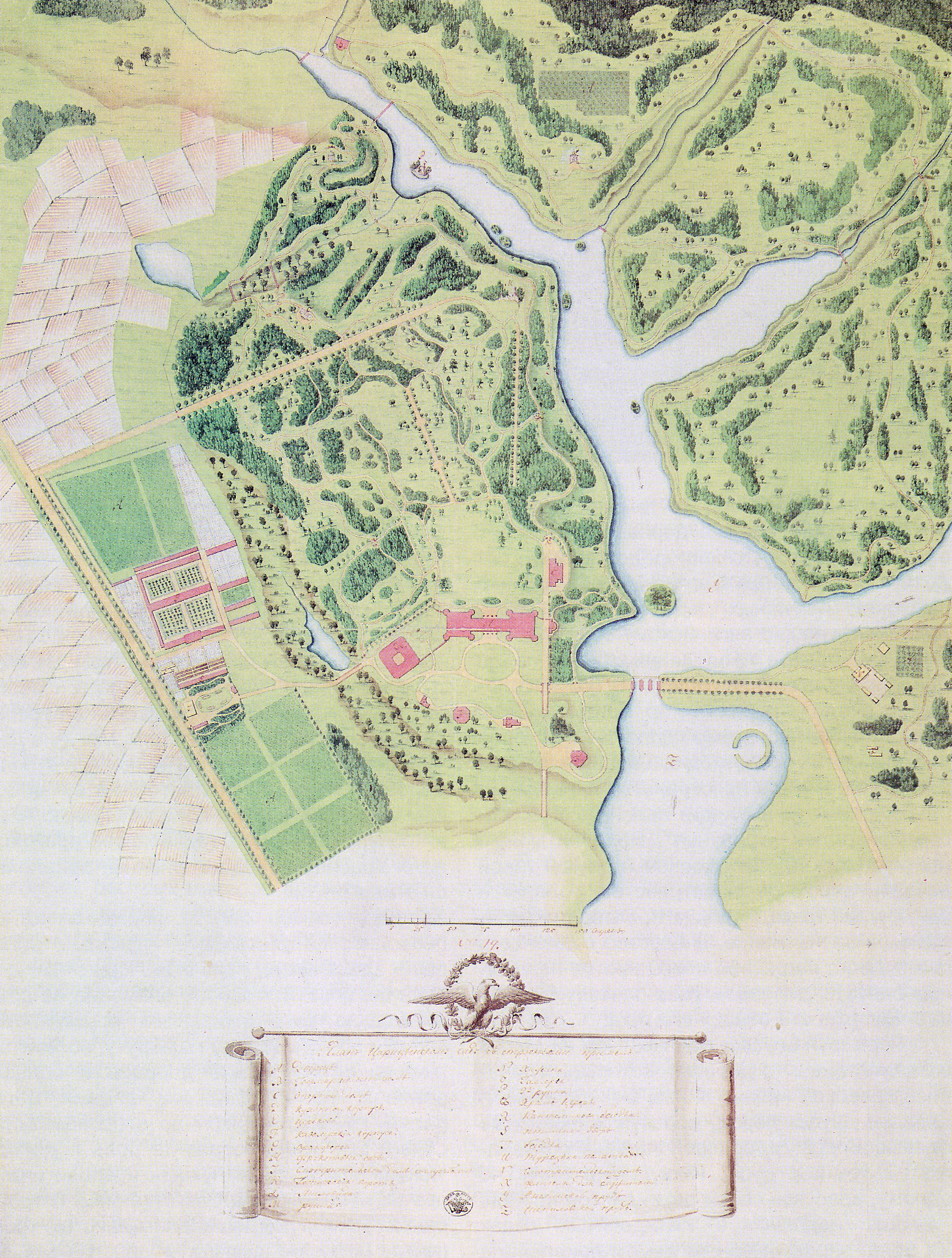 План дворцово-паркового ансамбля в 1810-е годы